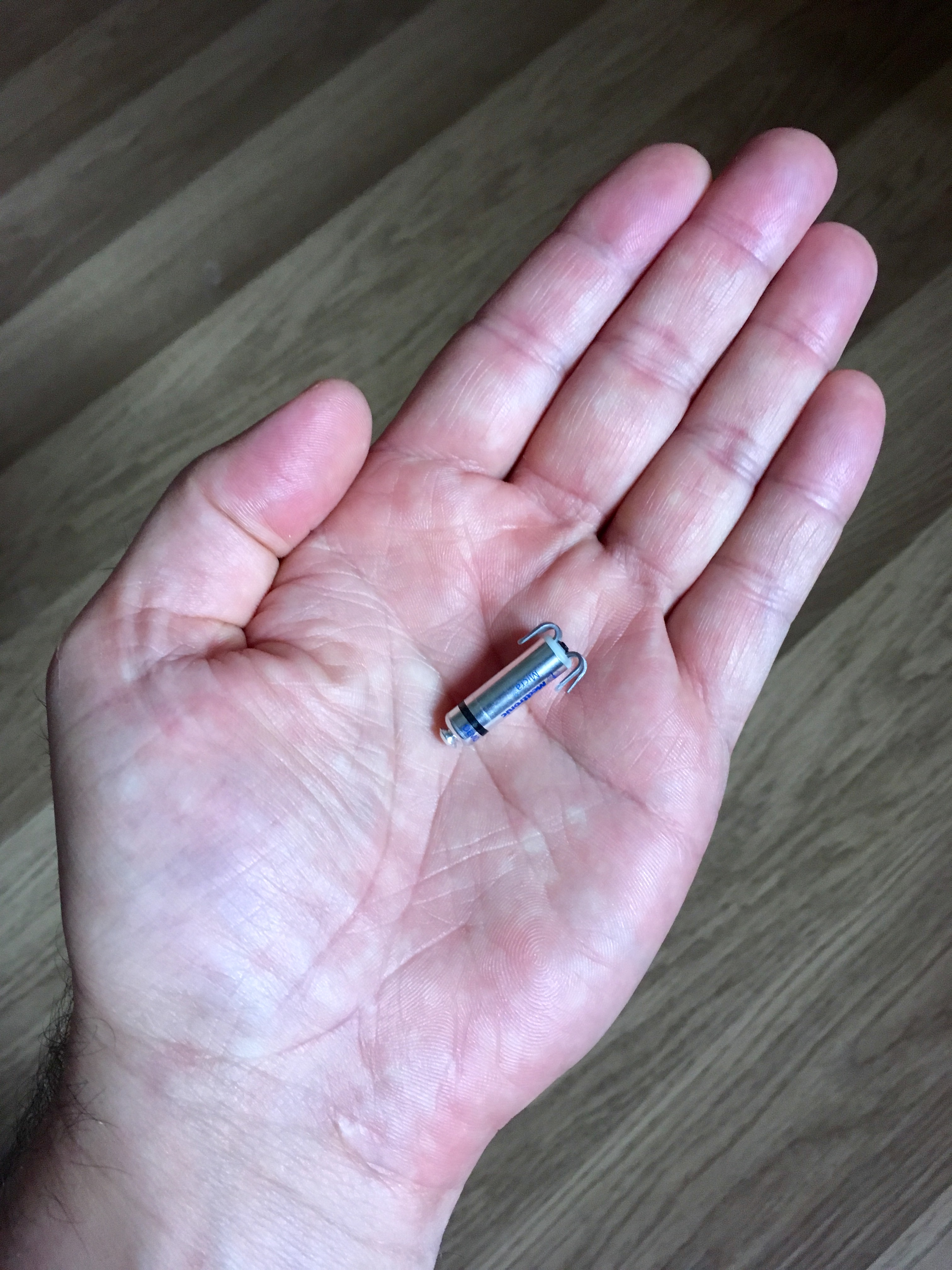 A készülék alig nagyobb mint egy vitamin kapszula